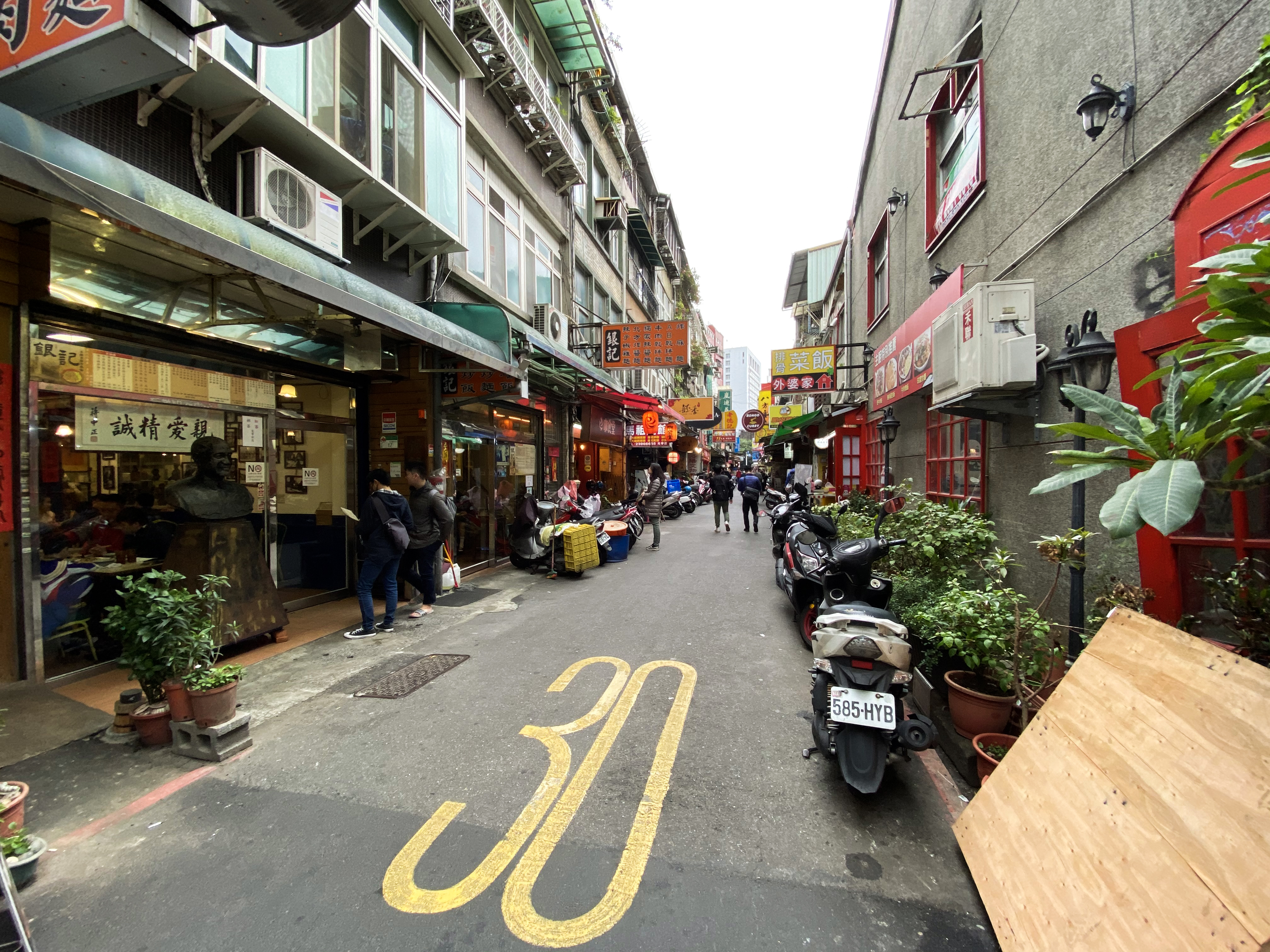 八德路一段82巷